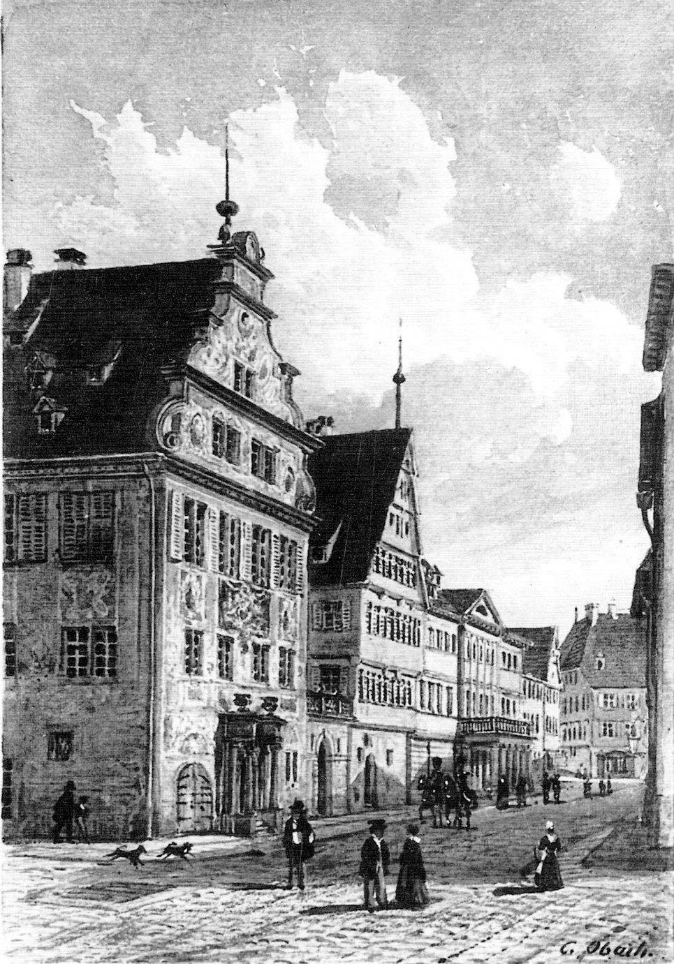 Stuttgart: Blick auf die Landtagsgebäude in der Kronprinzstraße um 1845